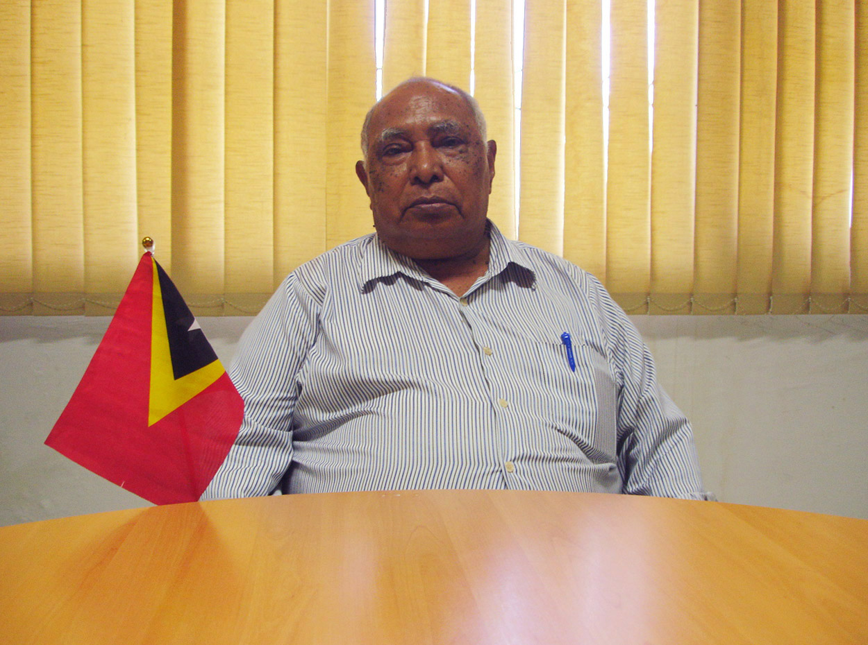 Martinho A. S. Matos, Administrator der Gemeinde Aileu